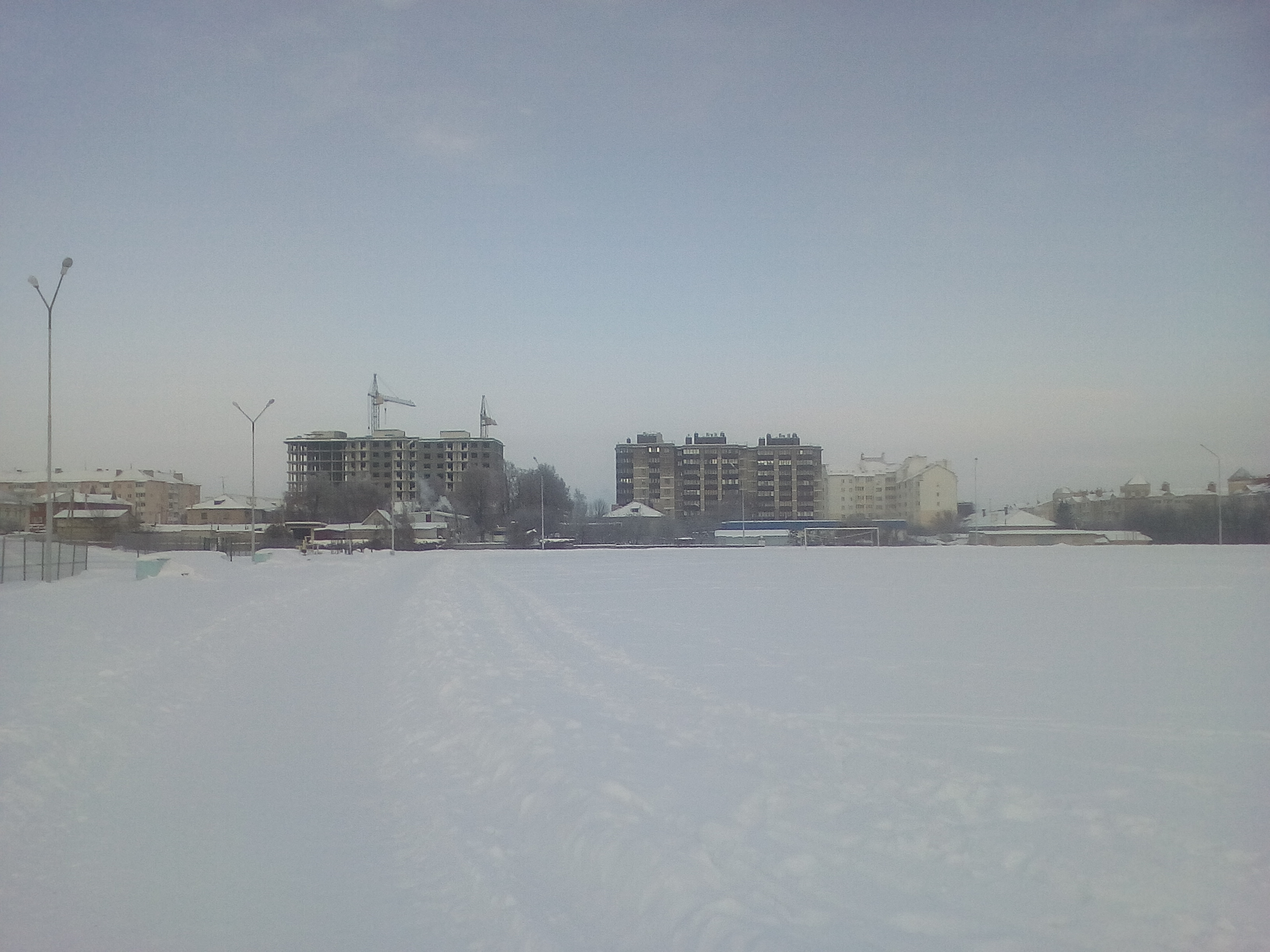 Строящийся дом в центре Дубового